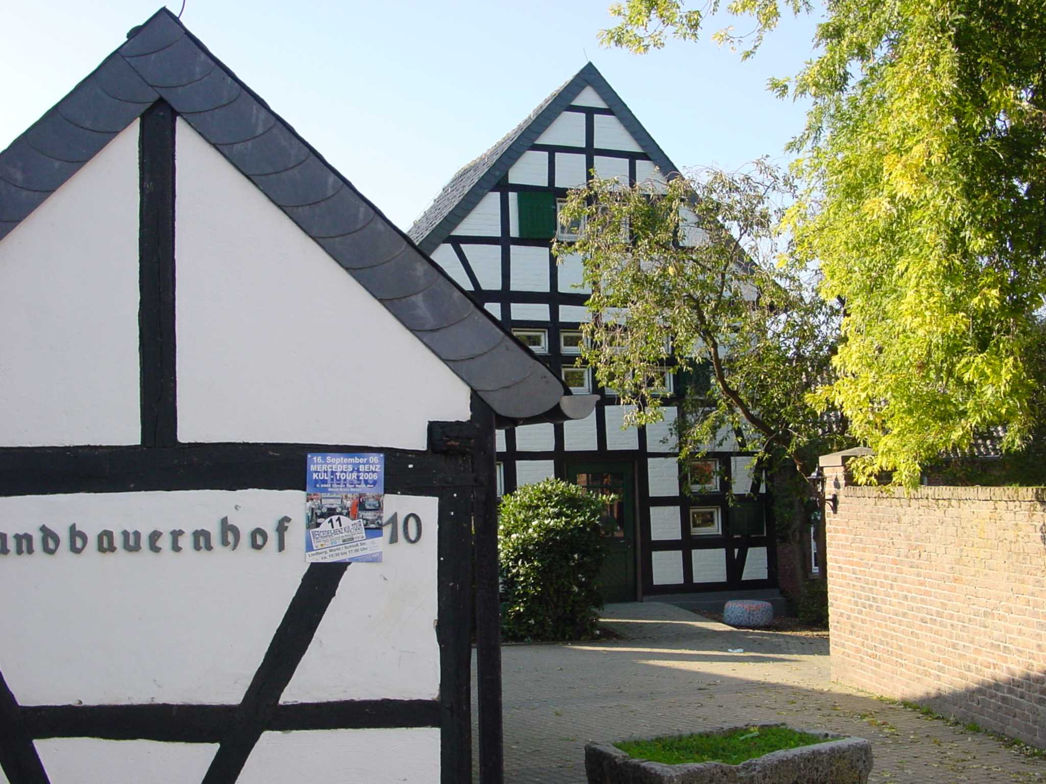 Der Sandbauernhof (Begegnungsstätte) in Korschenbroich-Liedberg